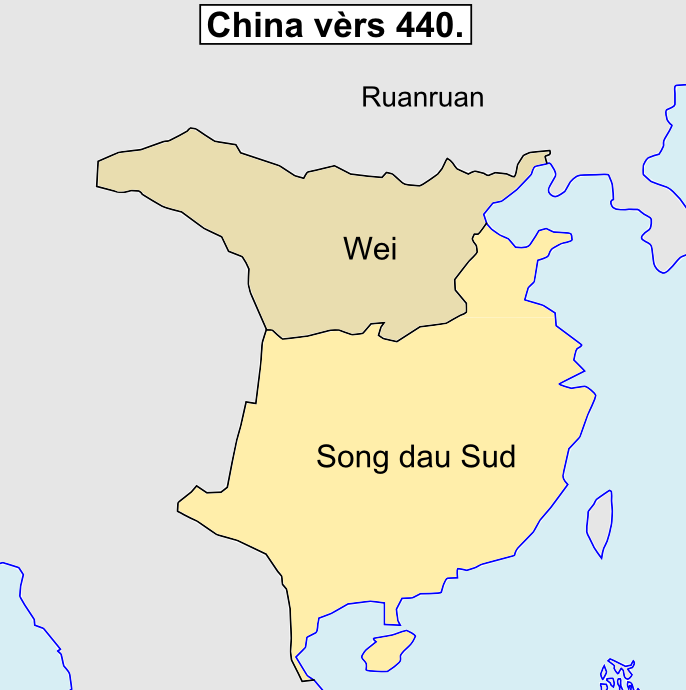 Division de China vèrs 440.